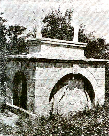 Гробницата на падналите в Илинденското въстание в село Цапари. Снимка от Първата световна война.